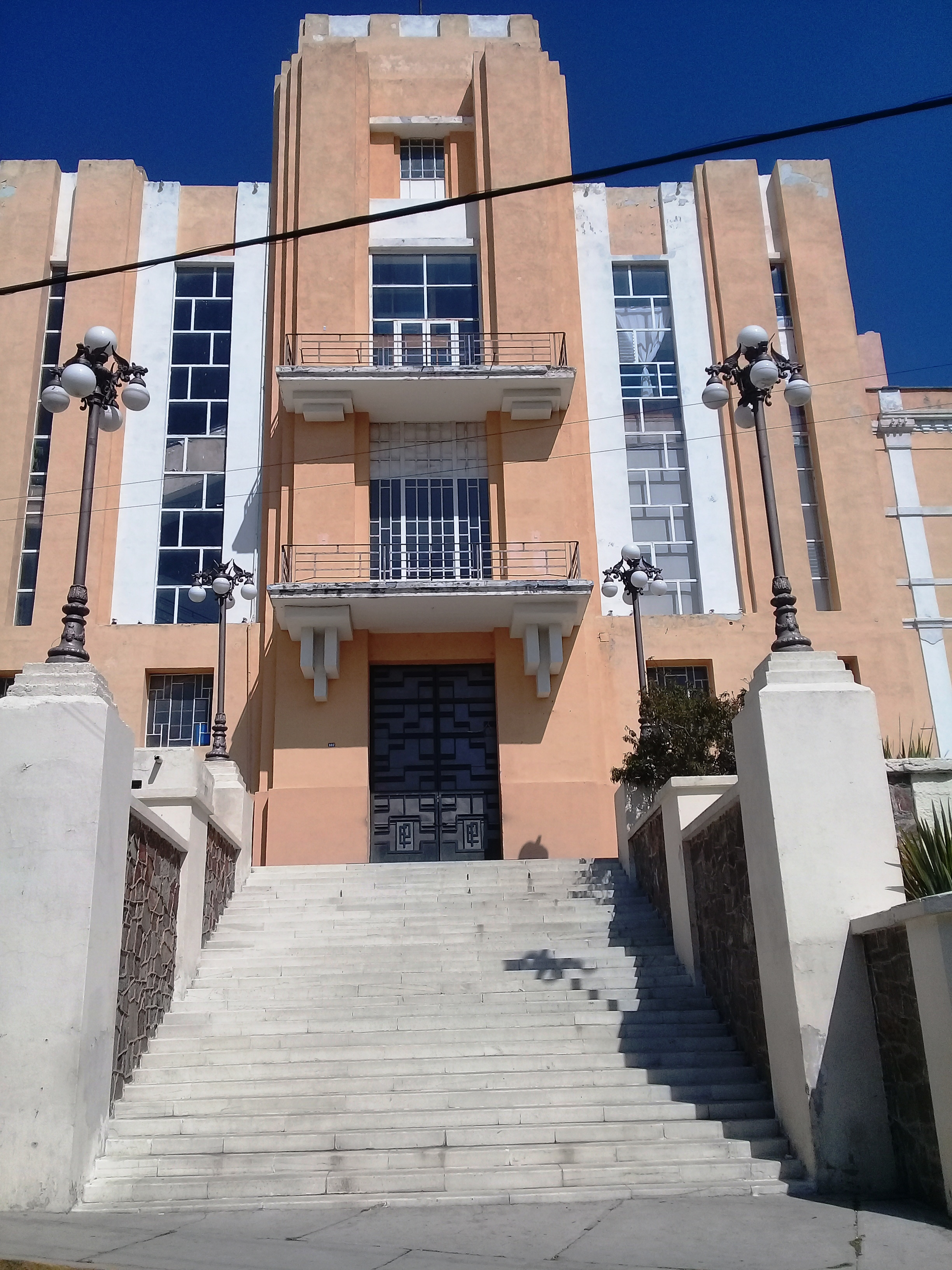 Edificio central UAEH, Pachuca.